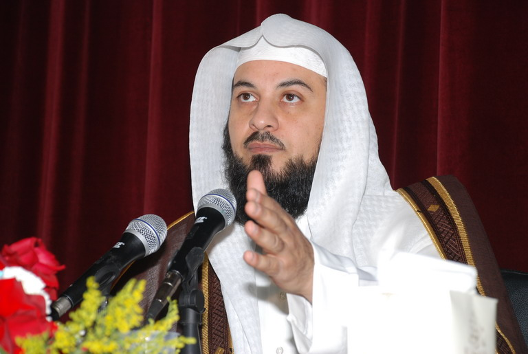 صور محاضرة الشيخ محمد العريفي ألقاها في ثانوية الأحمدي26/10/2009 ونظمتها إدارة الثقافة الإسلامية وقد حضر المحاضرة طلاب الثانوية والأساتذة والإداريين